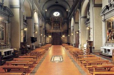 San domenico, prato, interno